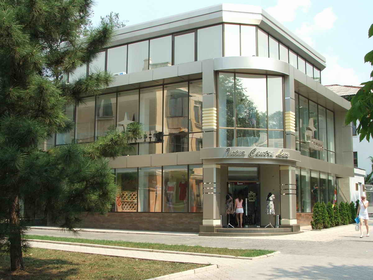 Магазин Интерцентр-Люкс в Тирасполе по улице 25 Октября в 2008 году